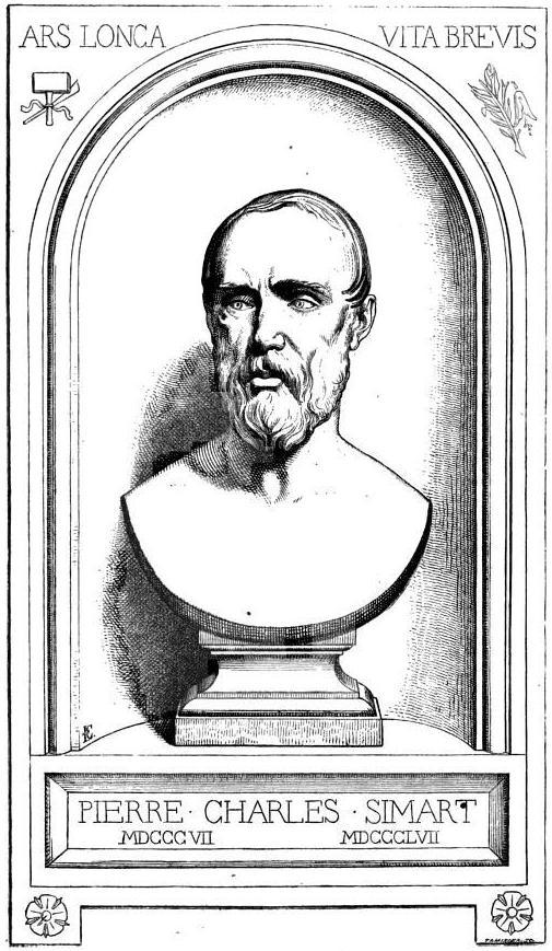 "Portrait de Simart. Dessin de Chevignard, reproduisant la gravure en taille-douce de M. Soumy d'après le buste sculpté par M. Duret".